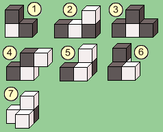 Egen teckning